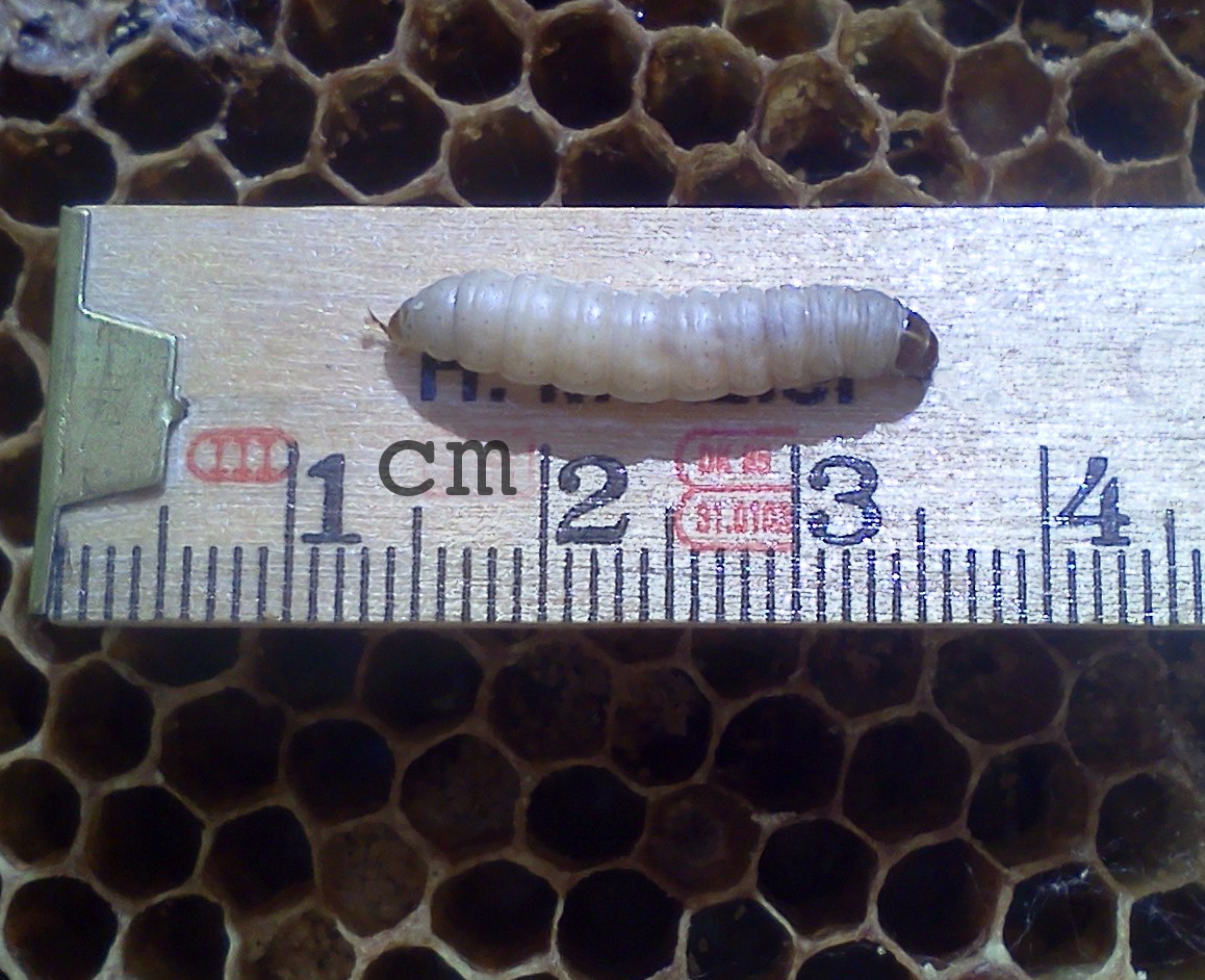 larve de fausse teigne